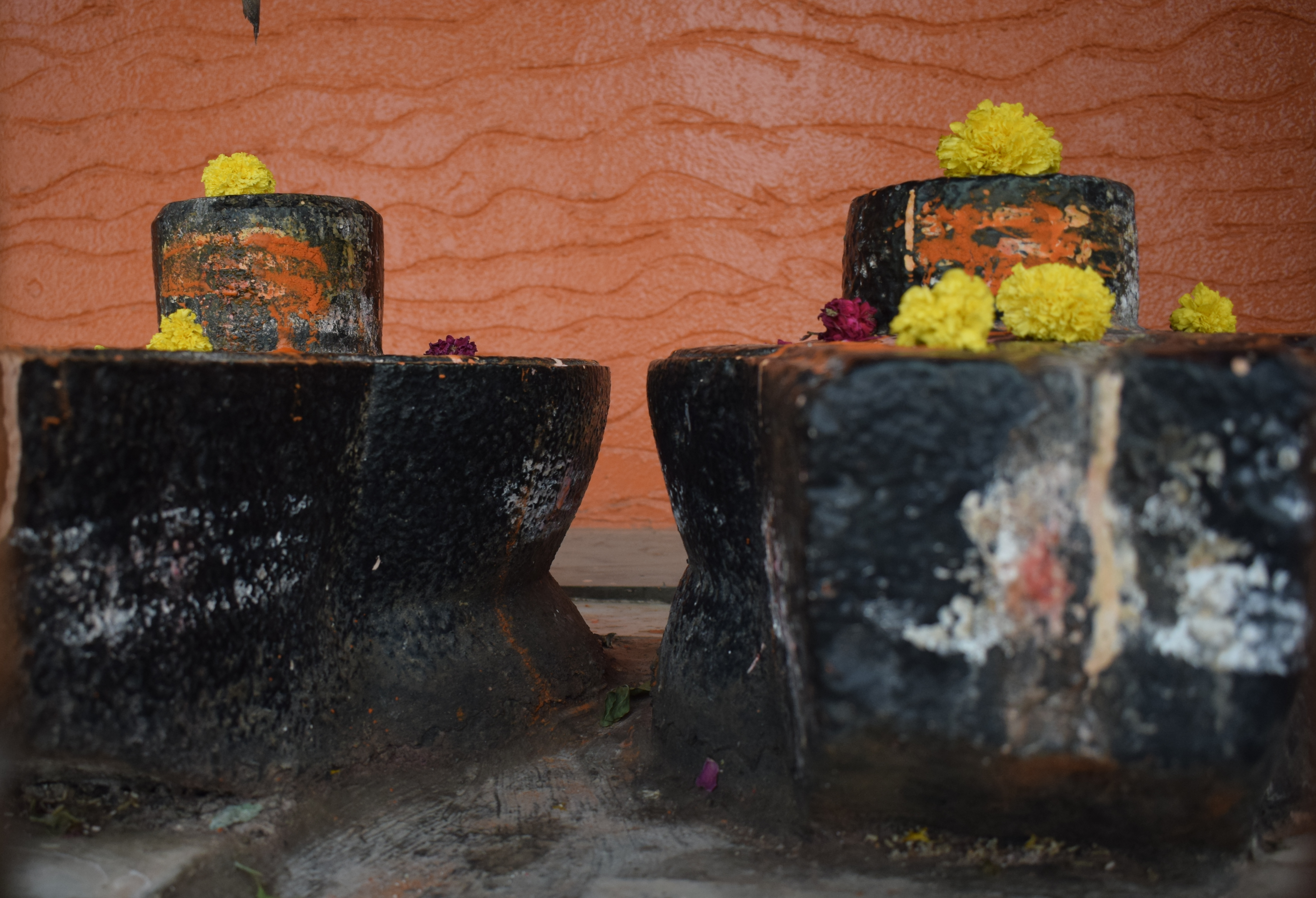 श्री गोमुख लिंग